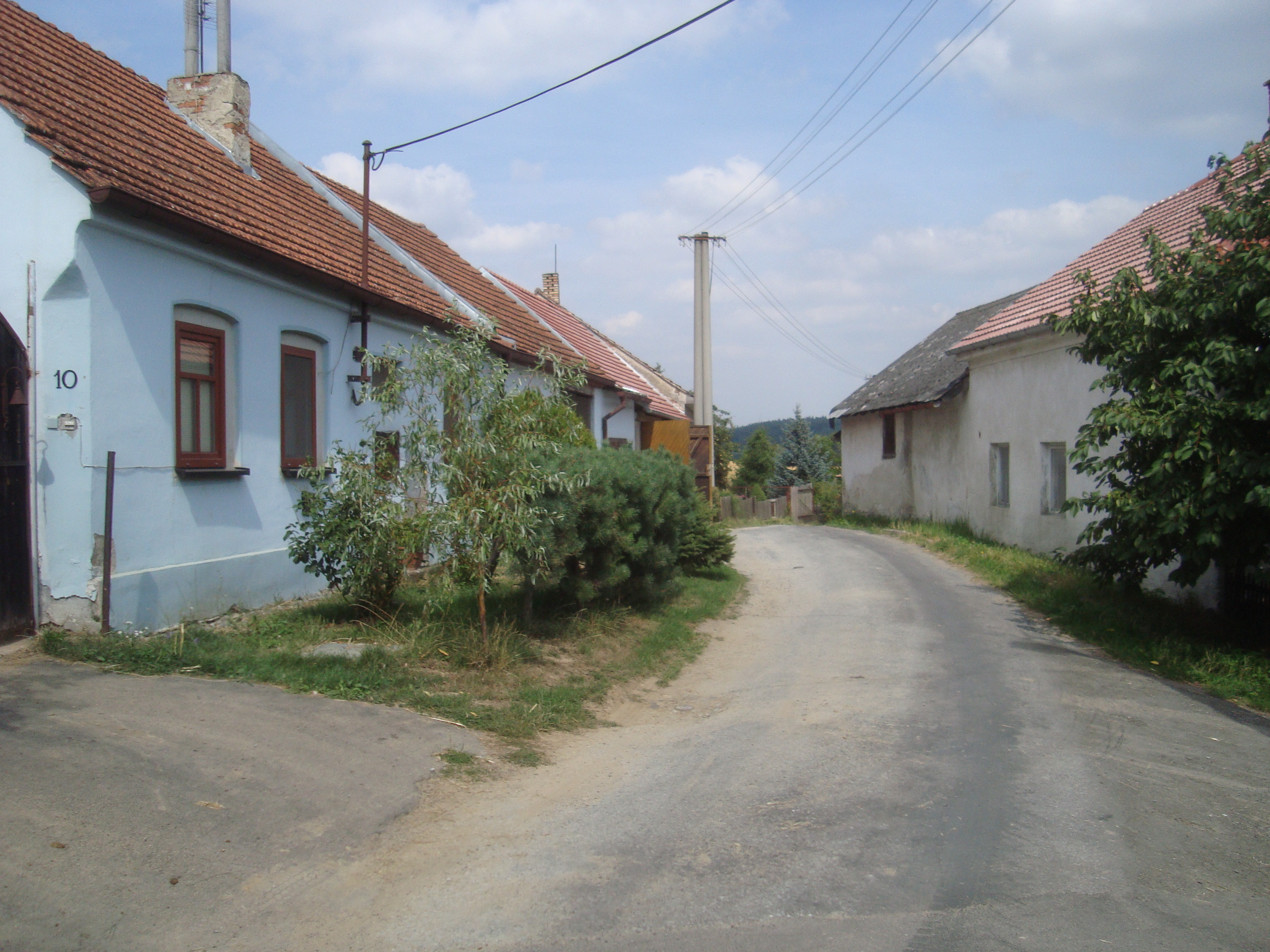 Holasice část Lažánek